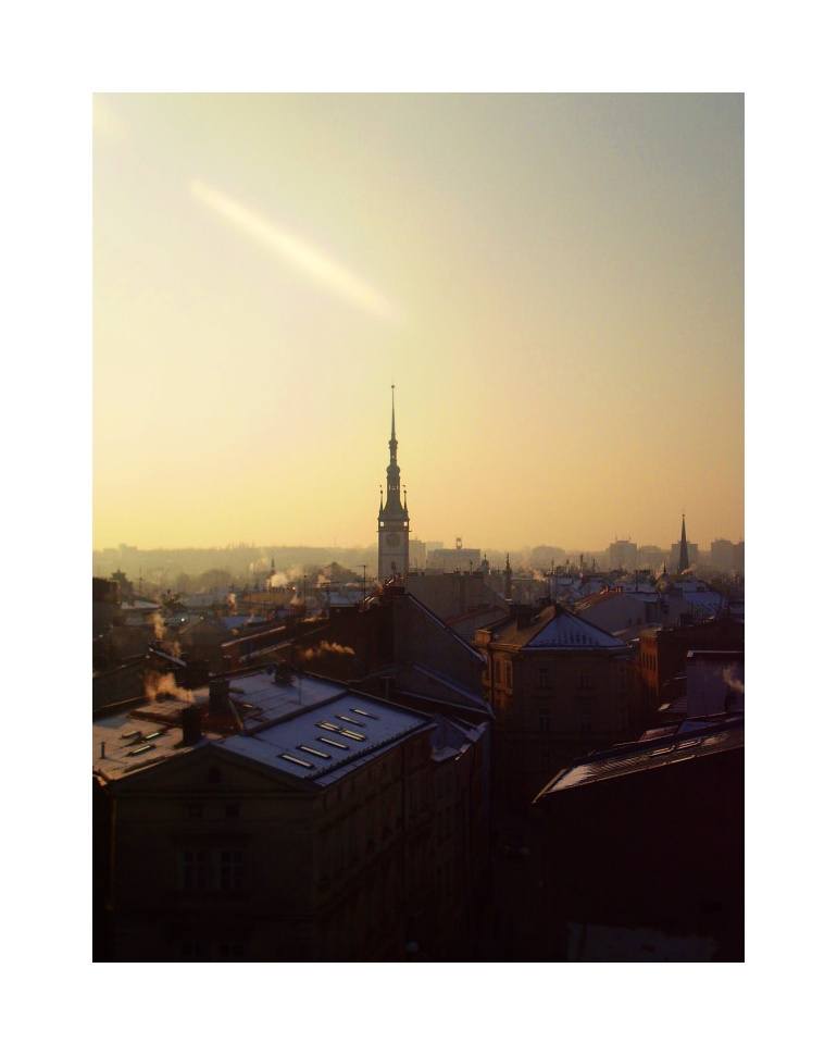 Olomouc